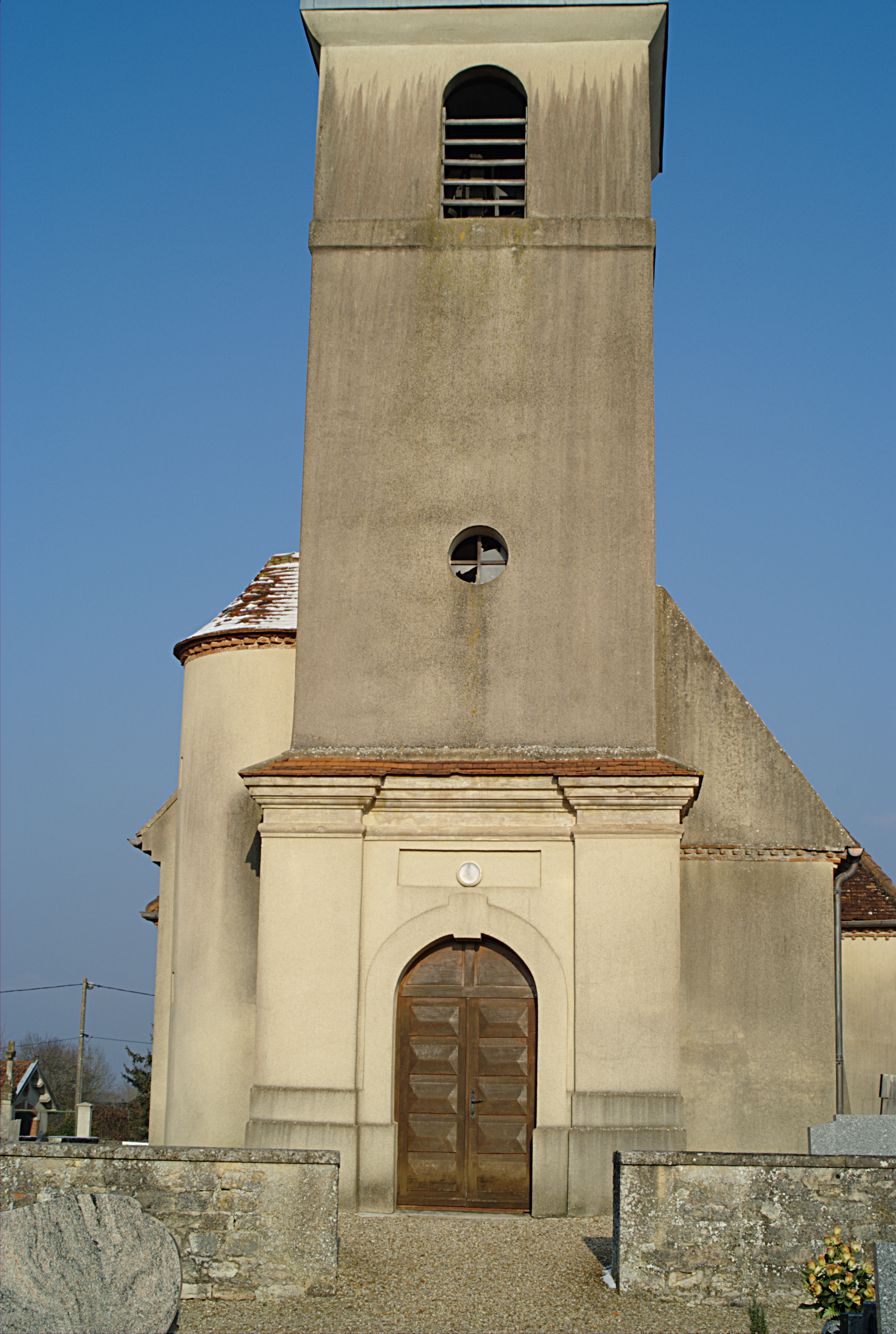 Église Saint-Pierre, Charrey-sur-Saône (Côte d'Or, Bourgogne, France)